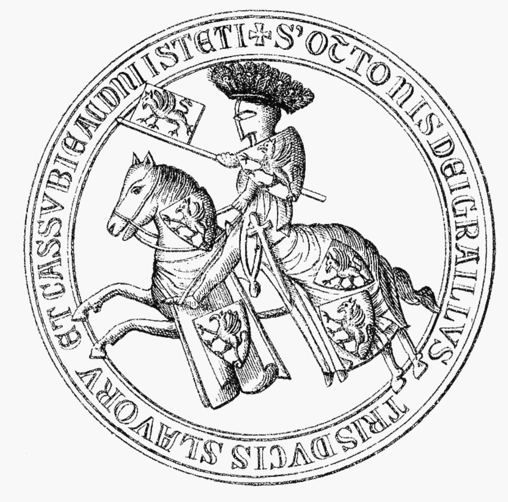 Siegel von Herzog Otto I. von Pommern